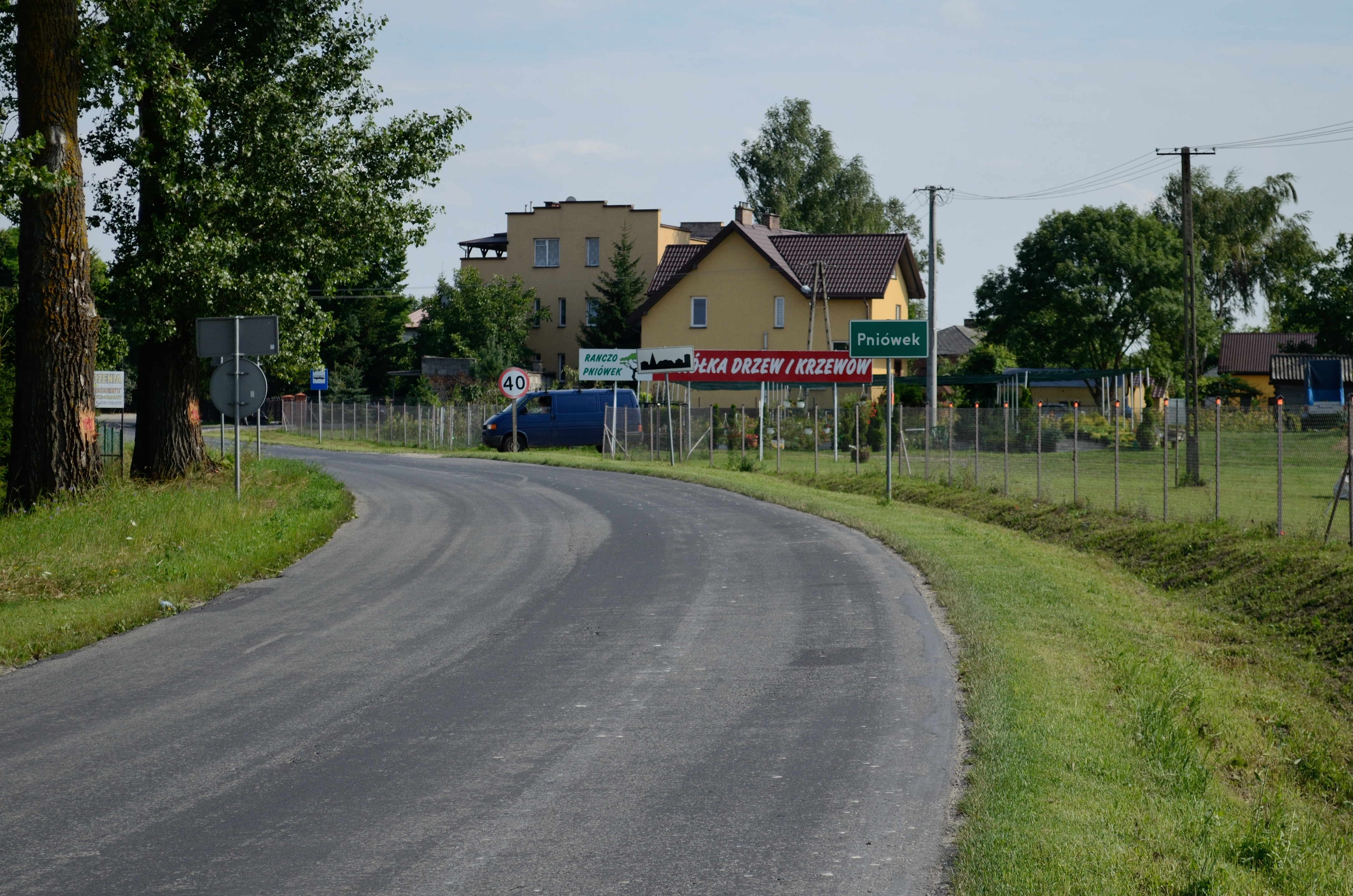 Pniówek - znak